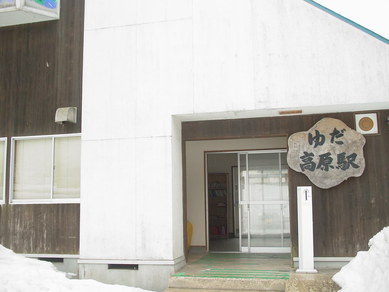 （ゆだ高原駅ホーム側）